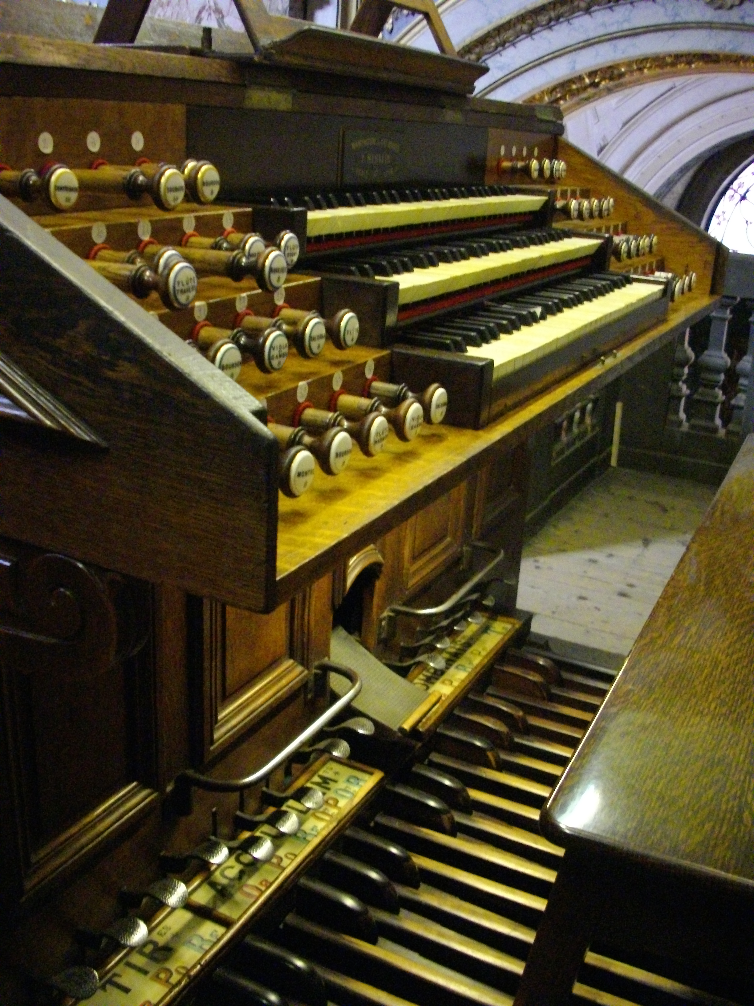 Consolle